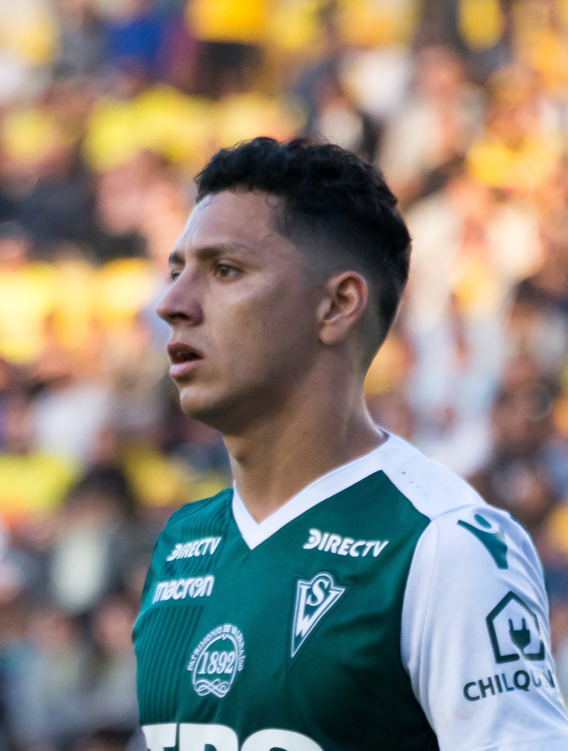 Juan Carlos Soto, San Luis v Santiago Wanderers, Estadio Municipal Lucio Fariña Fernández, Quillota, Región de Valparaíso, Chile.